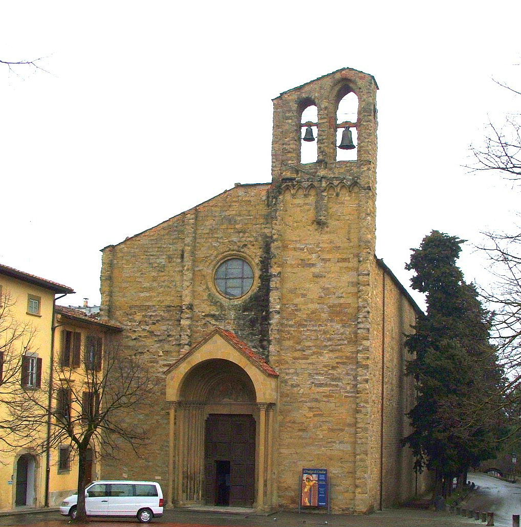 La chiesa di San Domenico ad Arezzo contenente il crocefisso di Cimabue.